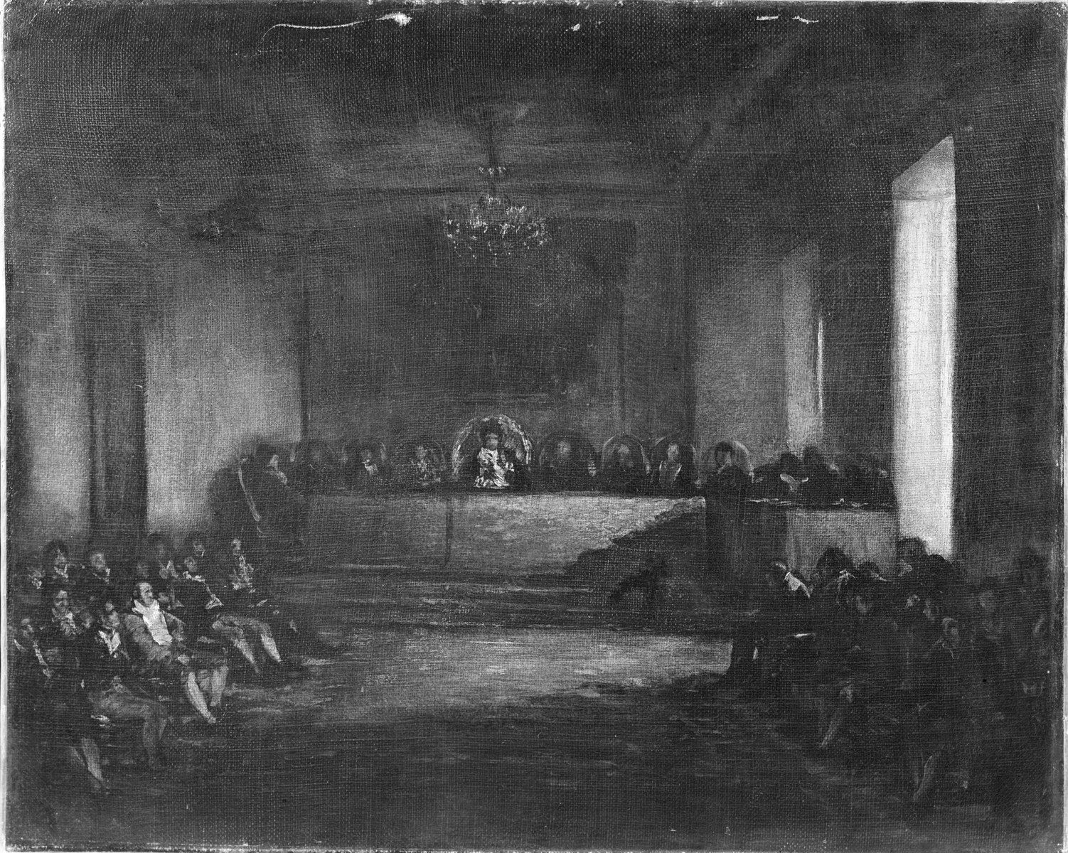 La Junta de Filipinas preparatory sketch